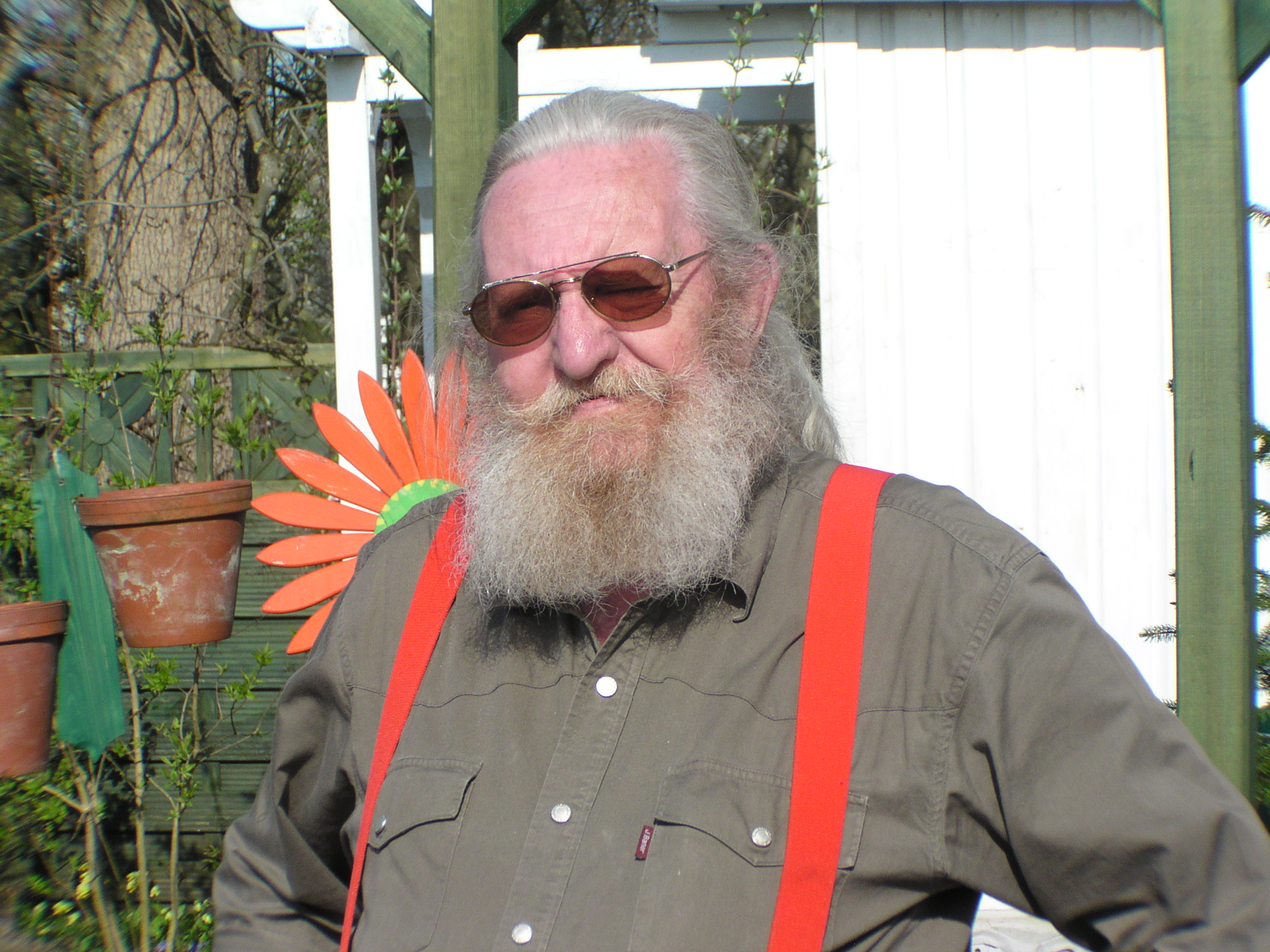 "Werner Gutzeit", Maler, Kubist